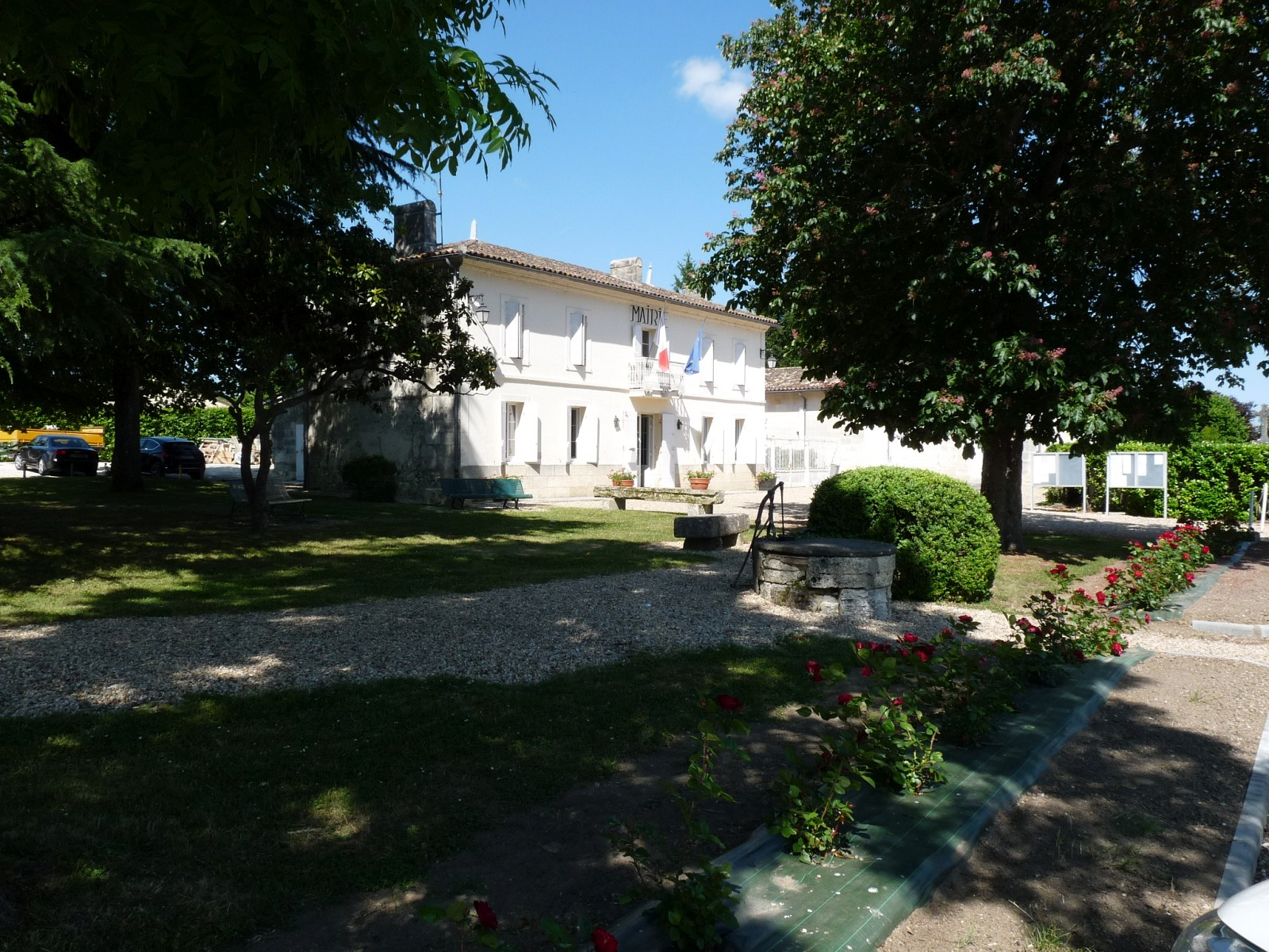 Place de Savignac-de-l'Isle, Gironde, France